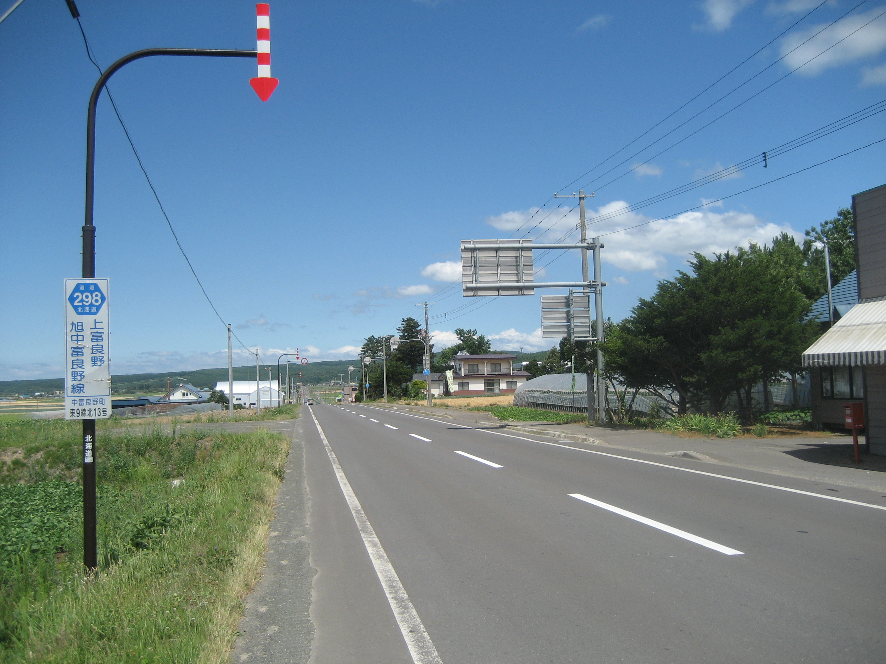 道道298号線中富良野町東9線北13号付近